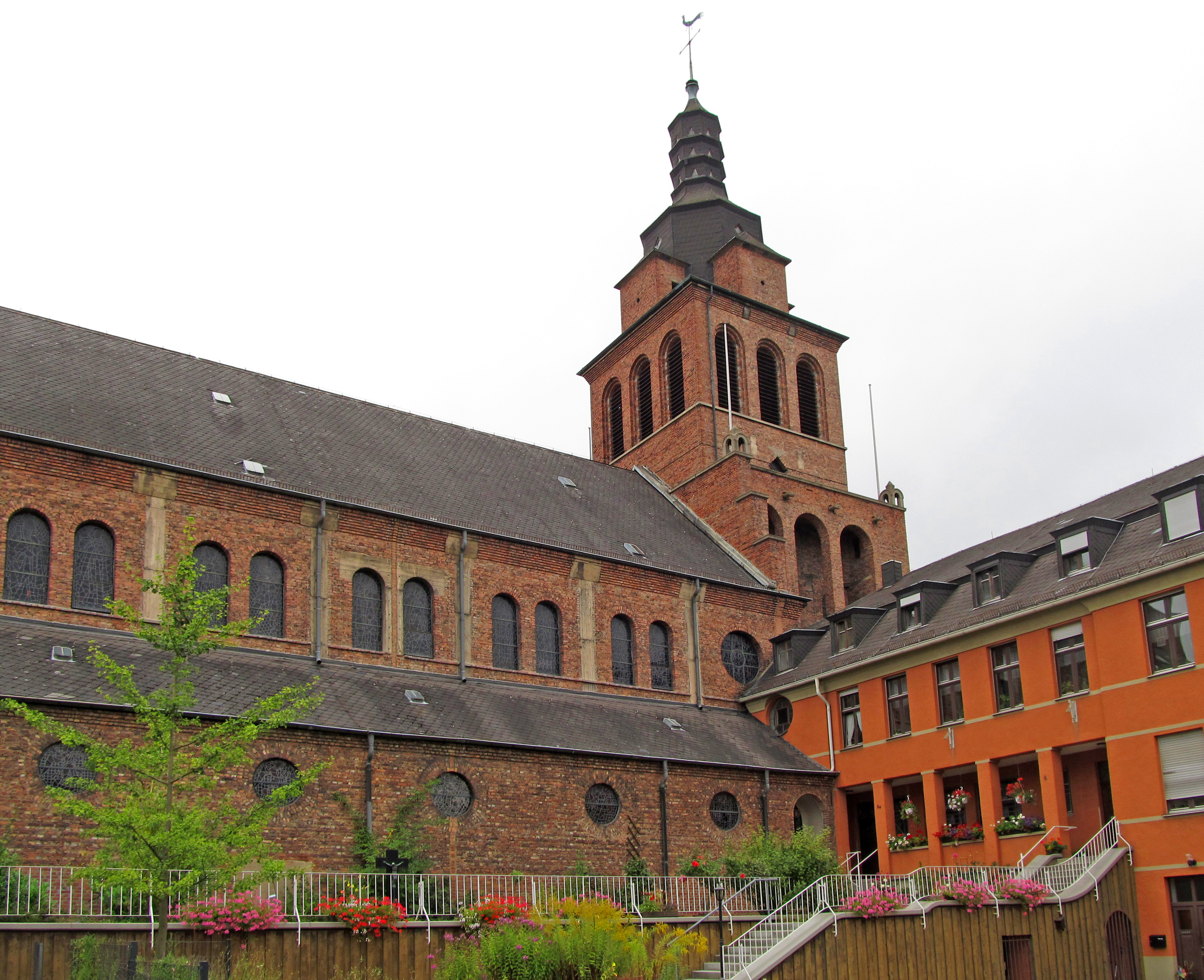 Die katholische Pfarrkirche Allerheiligen in Sulzbach, Saarland